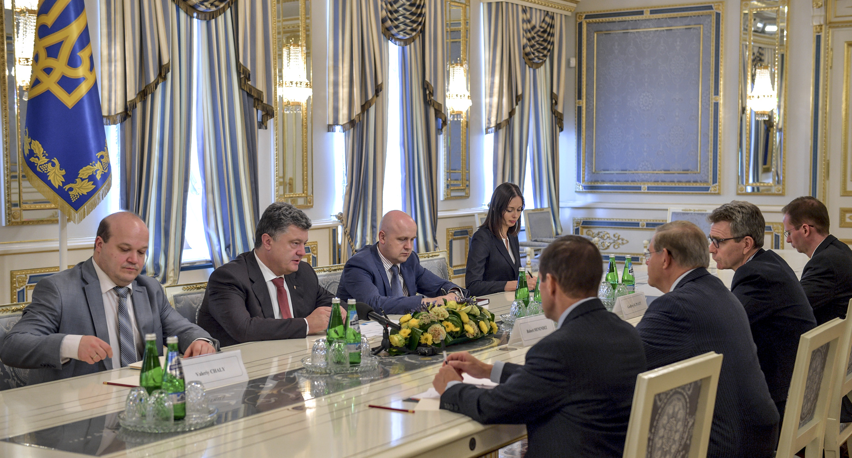 Senator Robert Menendez, CODEL, Kyiv, Ukraine, Sept. 1, 2014